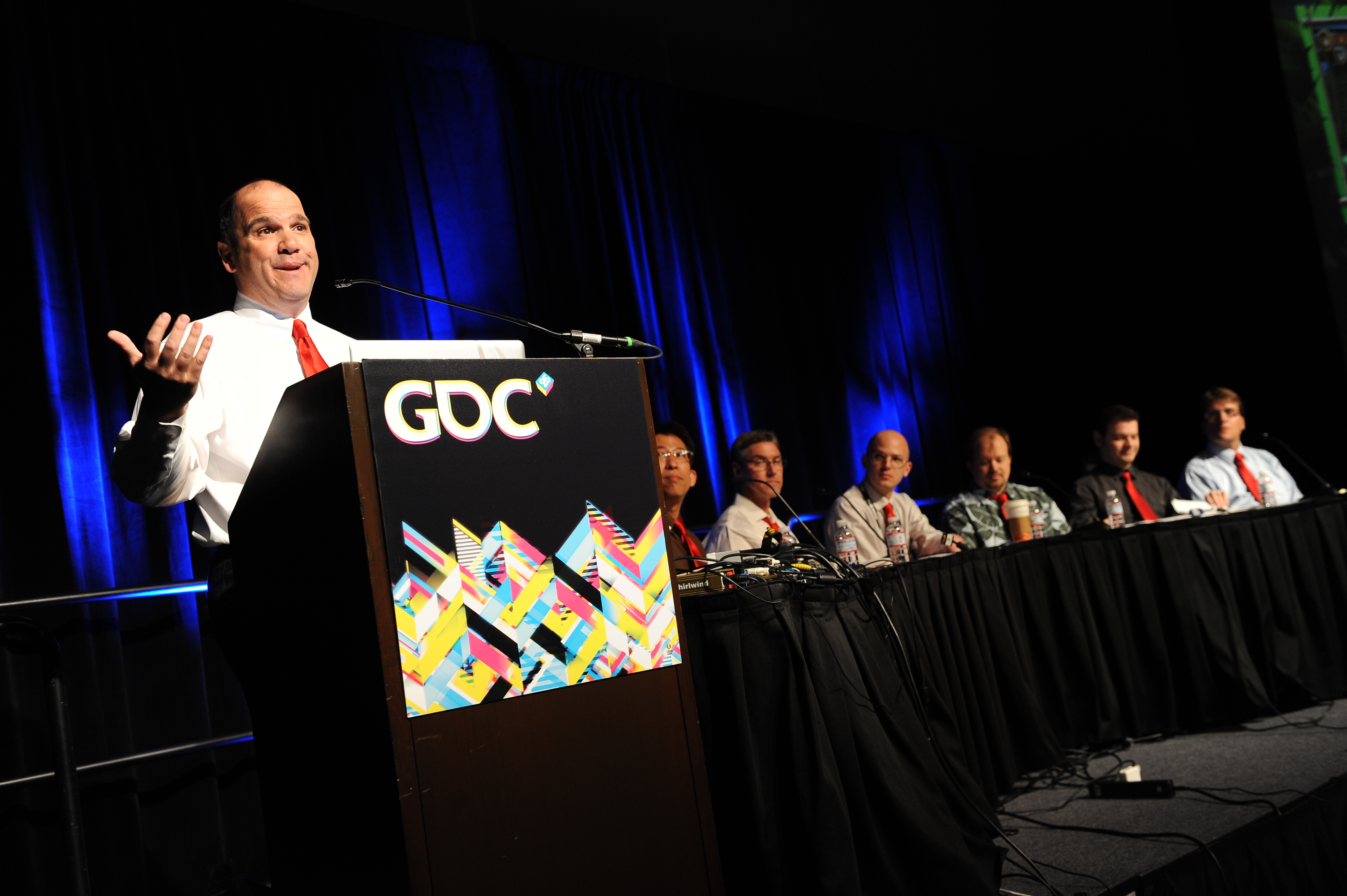 Photographie du staff de Donkey Kong Country Returns